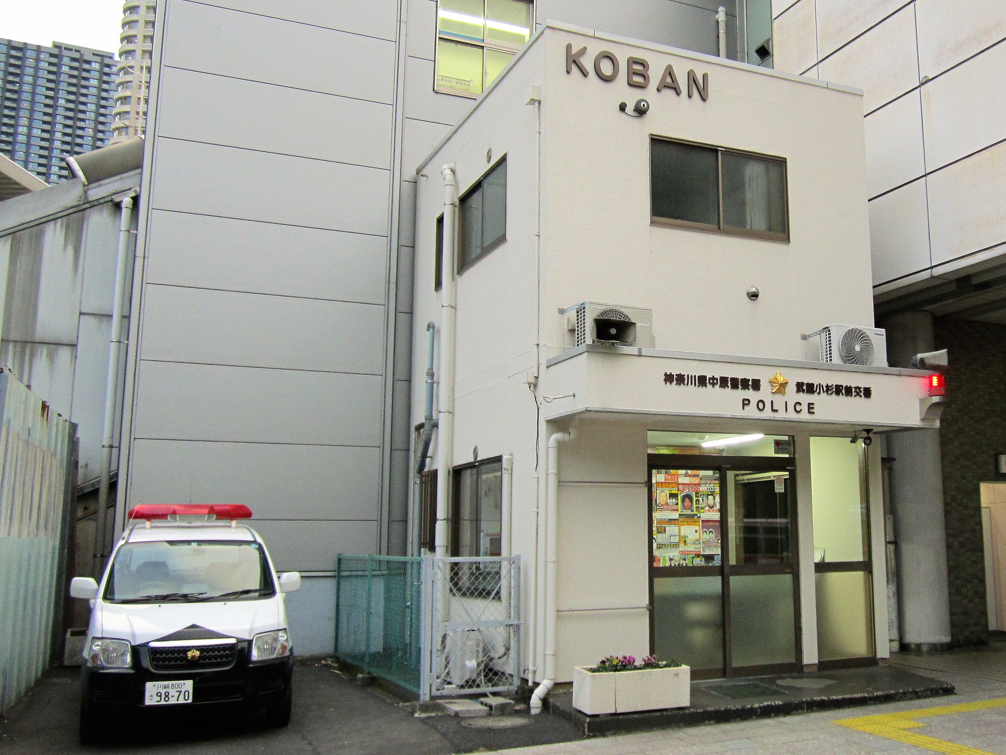 中原警察署 武蔵小杉駅前交番（川崎市中原区小杉町） Canon PowerShot A2200